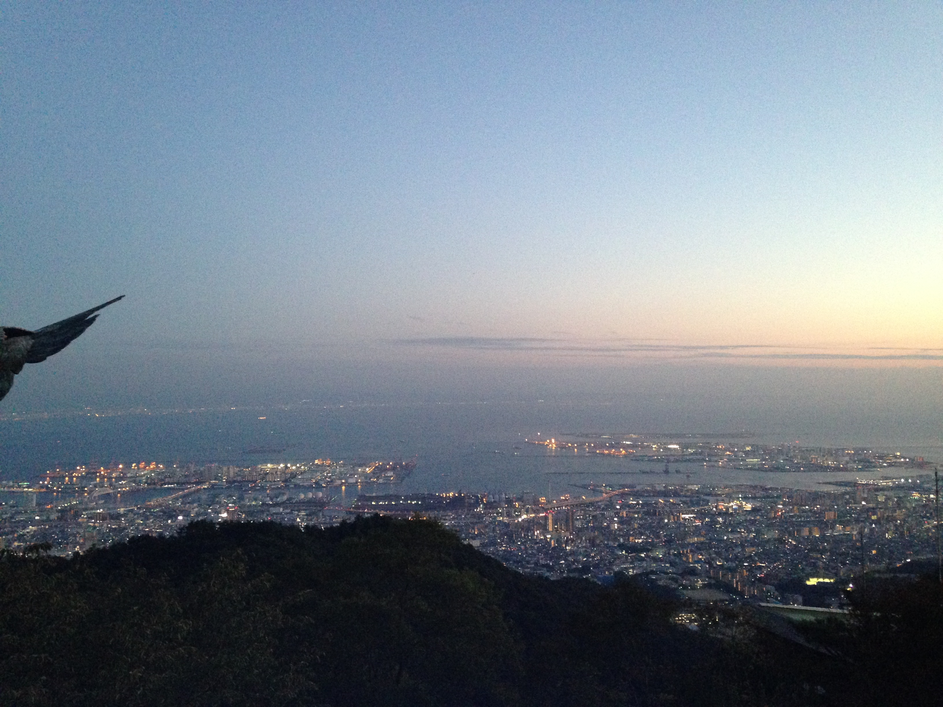 天覧台より望む夕景(六甲アイランド・ポートアイランド方面)